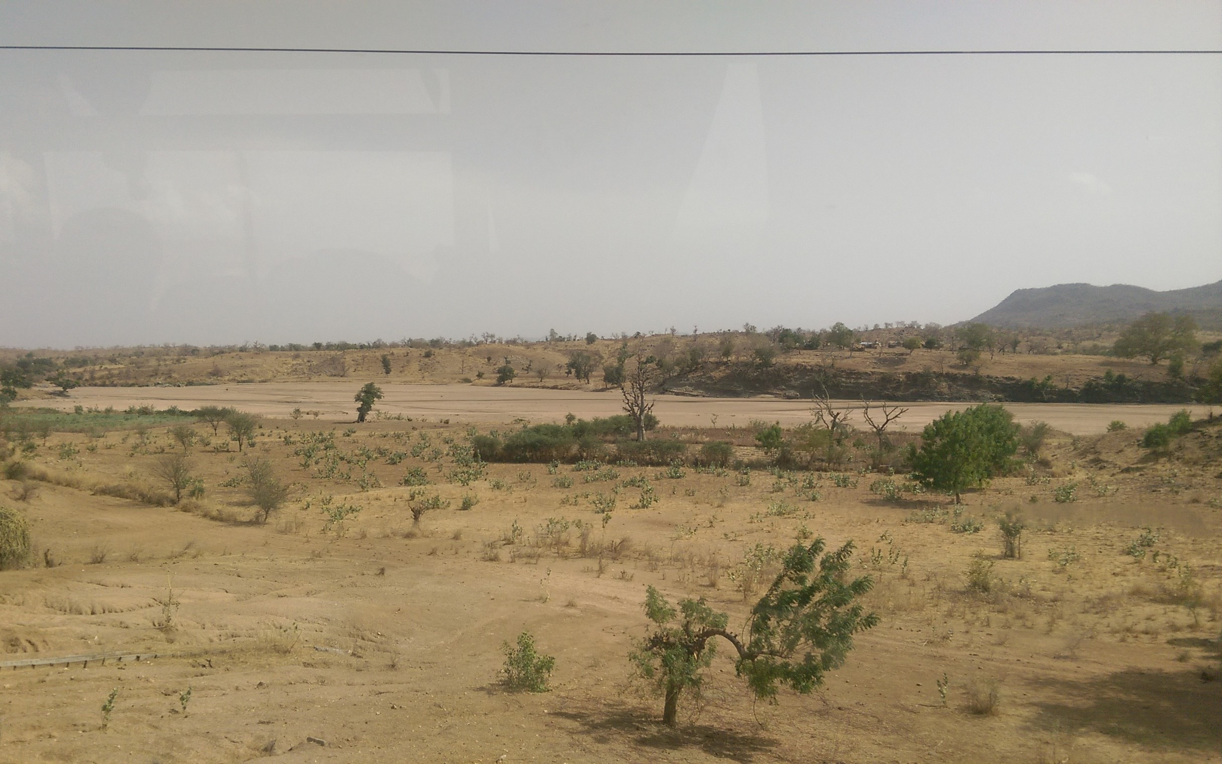 Un des Mayo dans l'Extrême-Nord du Cameroun